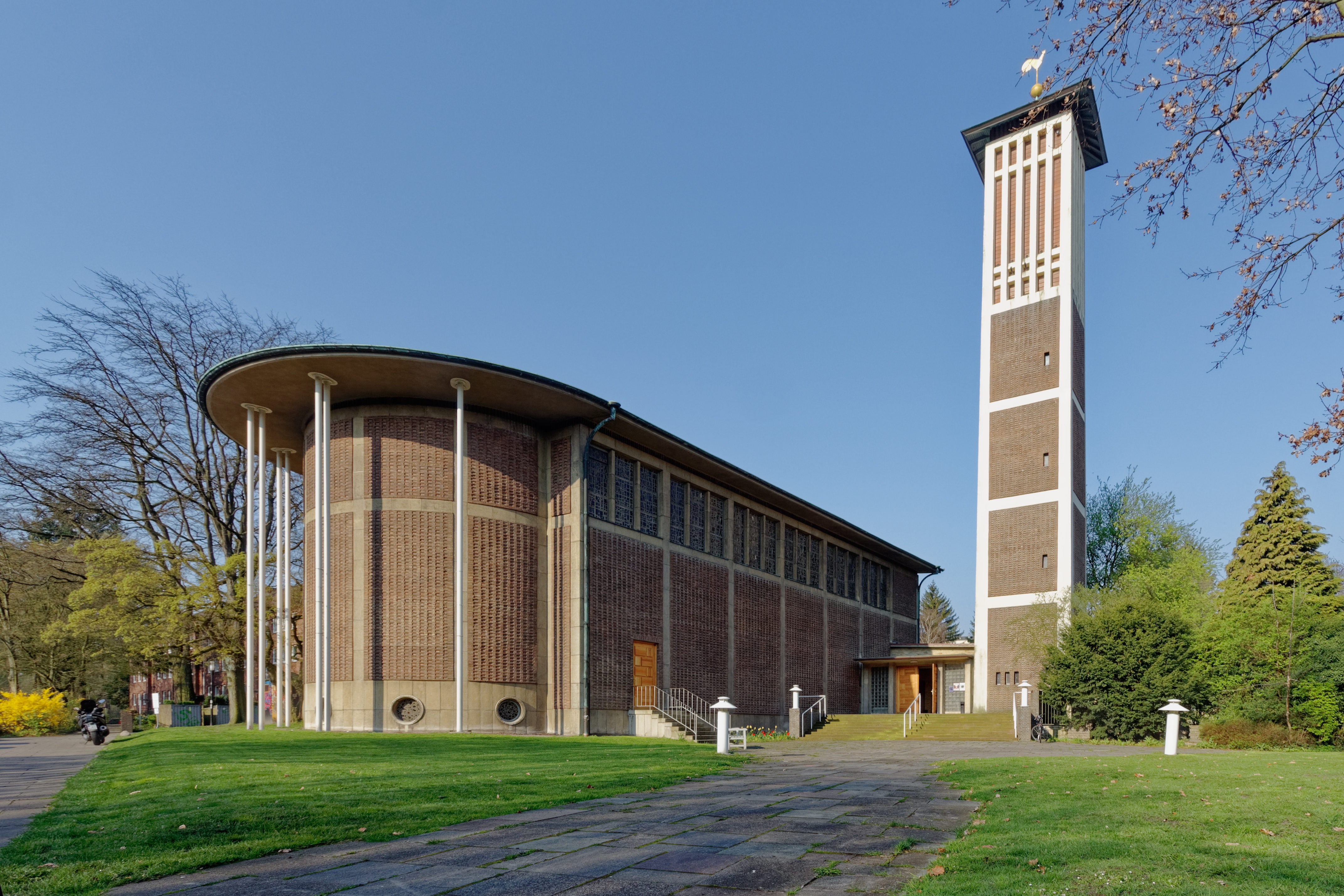 Paul-Gerhardt-Kirche in Hamburg-Bahrenfeld, Aussenansicht, Nordostseite